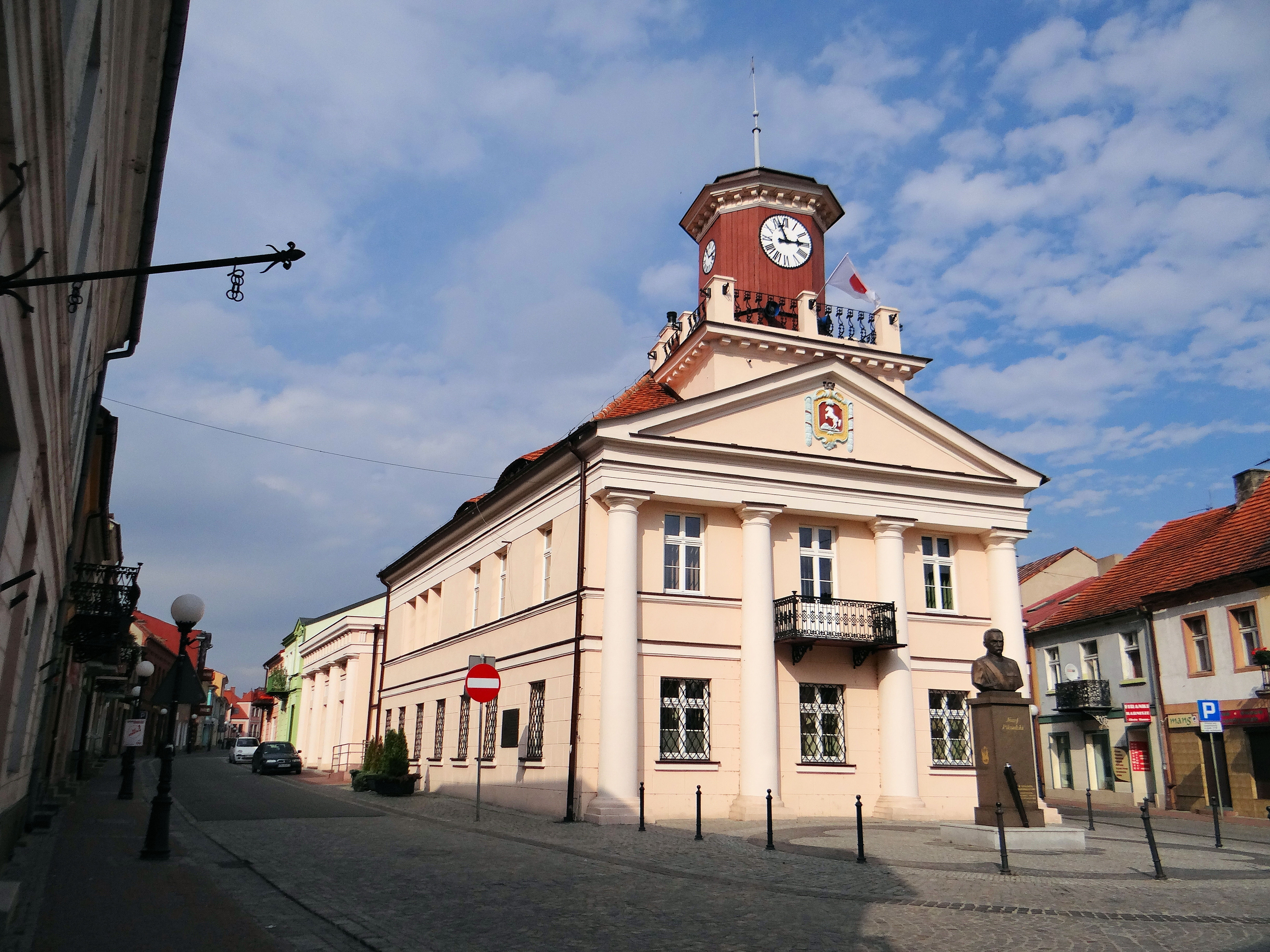 Ratusz w Koninie